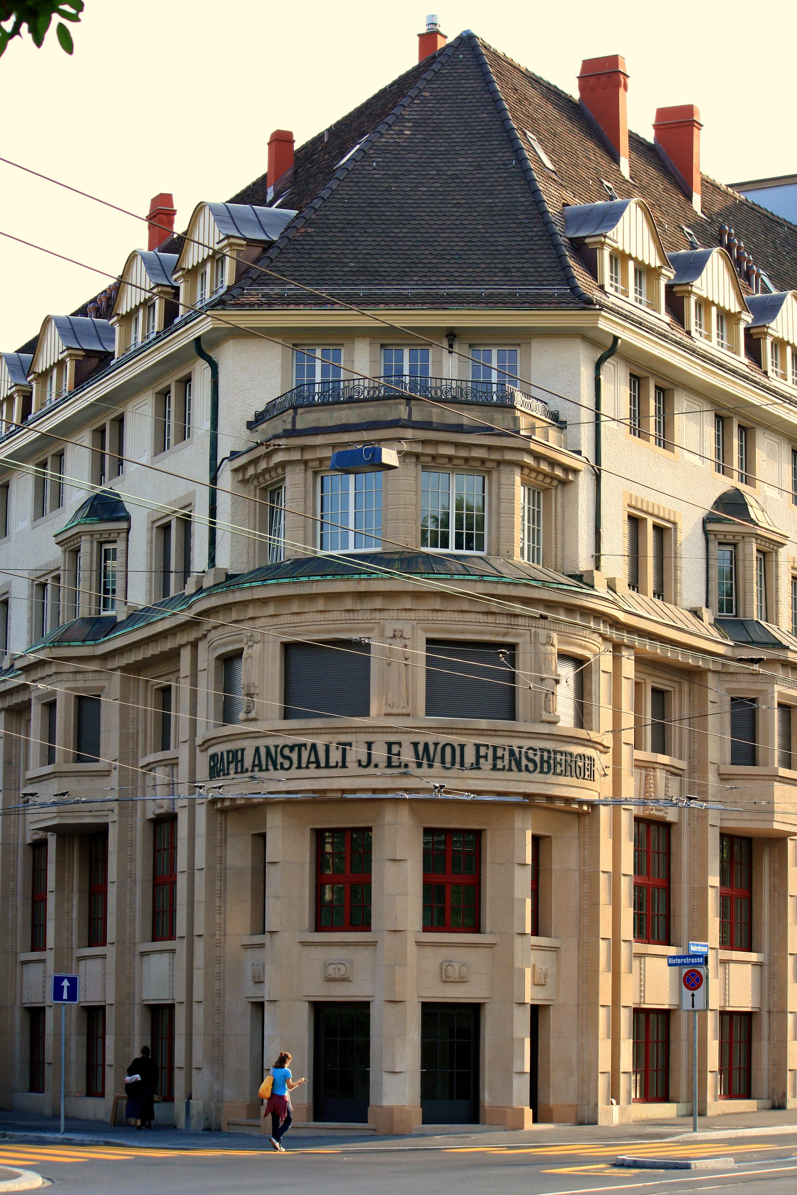 Haus zum Wolfsberg in Zürich-Enge (Switzerland), as seen from Beder-/Rieterstrasse